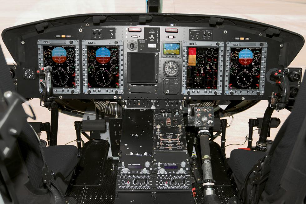 Cockpit de los ejemplares de Agusta Bell AB-212 de la Armada Española modernizados según el programa PEVH.